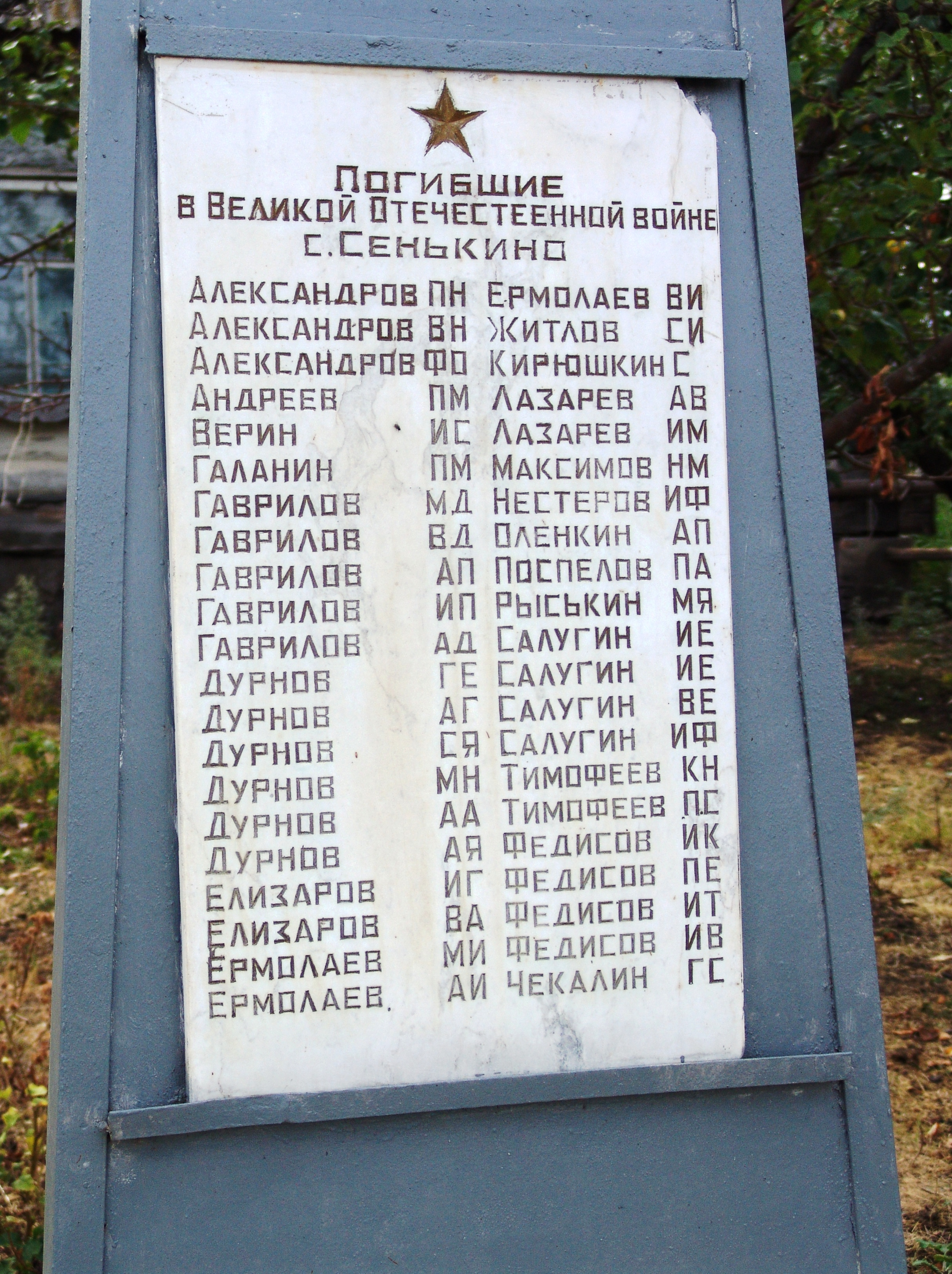 Шигонский район, Село Сенькино, список погибших в ВОВ на обелиске а центре села